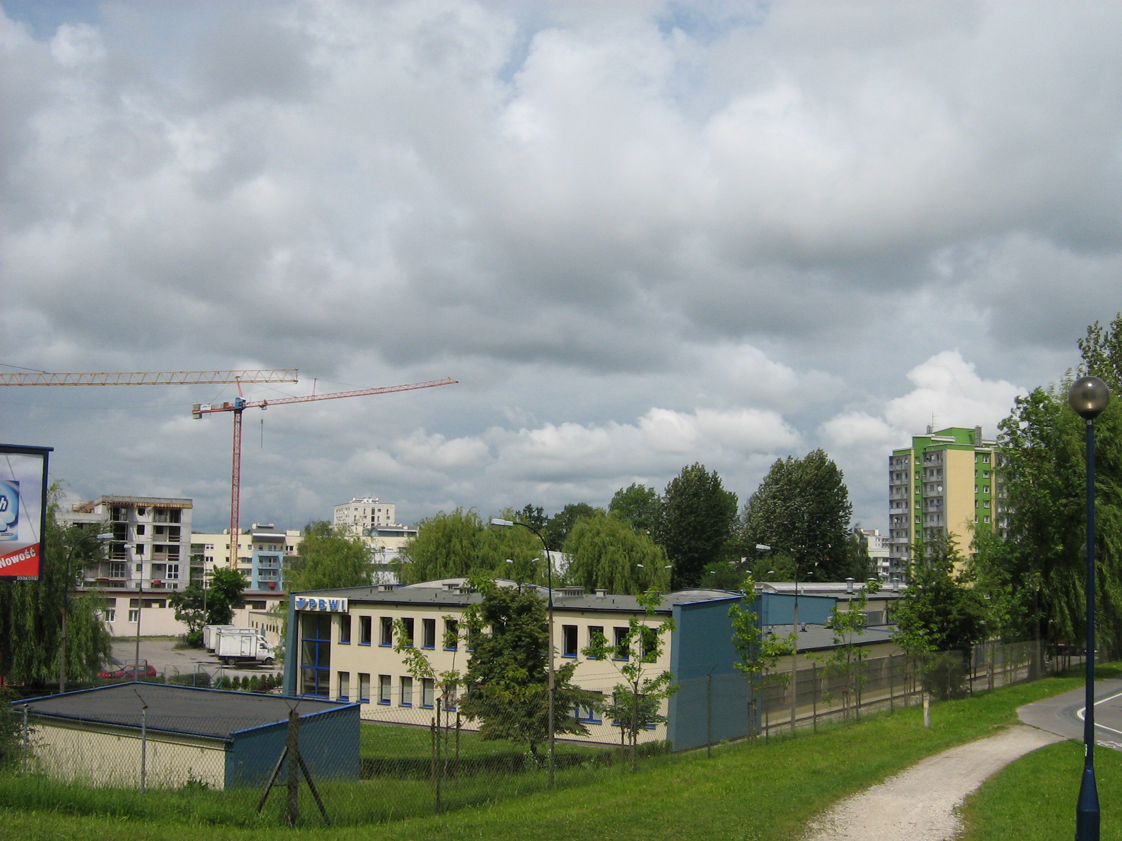 Panorama na Dąbie ze stopnia wodnego